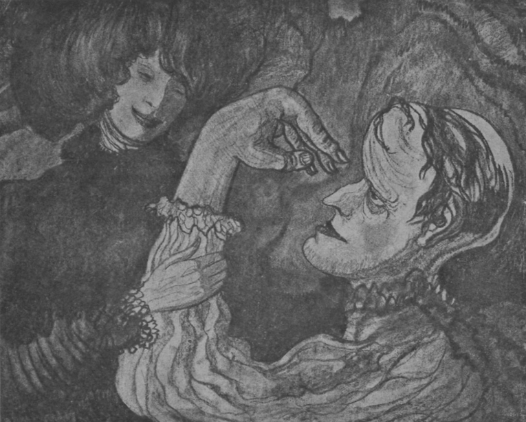 Drawning by Witkacy from book "Historje manjaków"